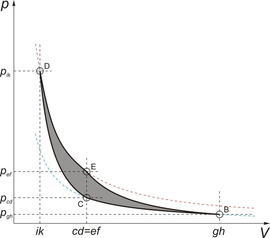 Идеальный цикл Карно